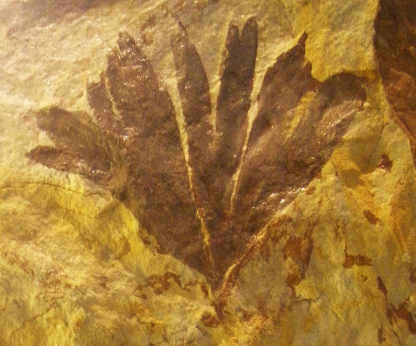 Fossil of Ginkgo huttoni, an extinct plant - Took the photo at Naturalis museum, Leiden